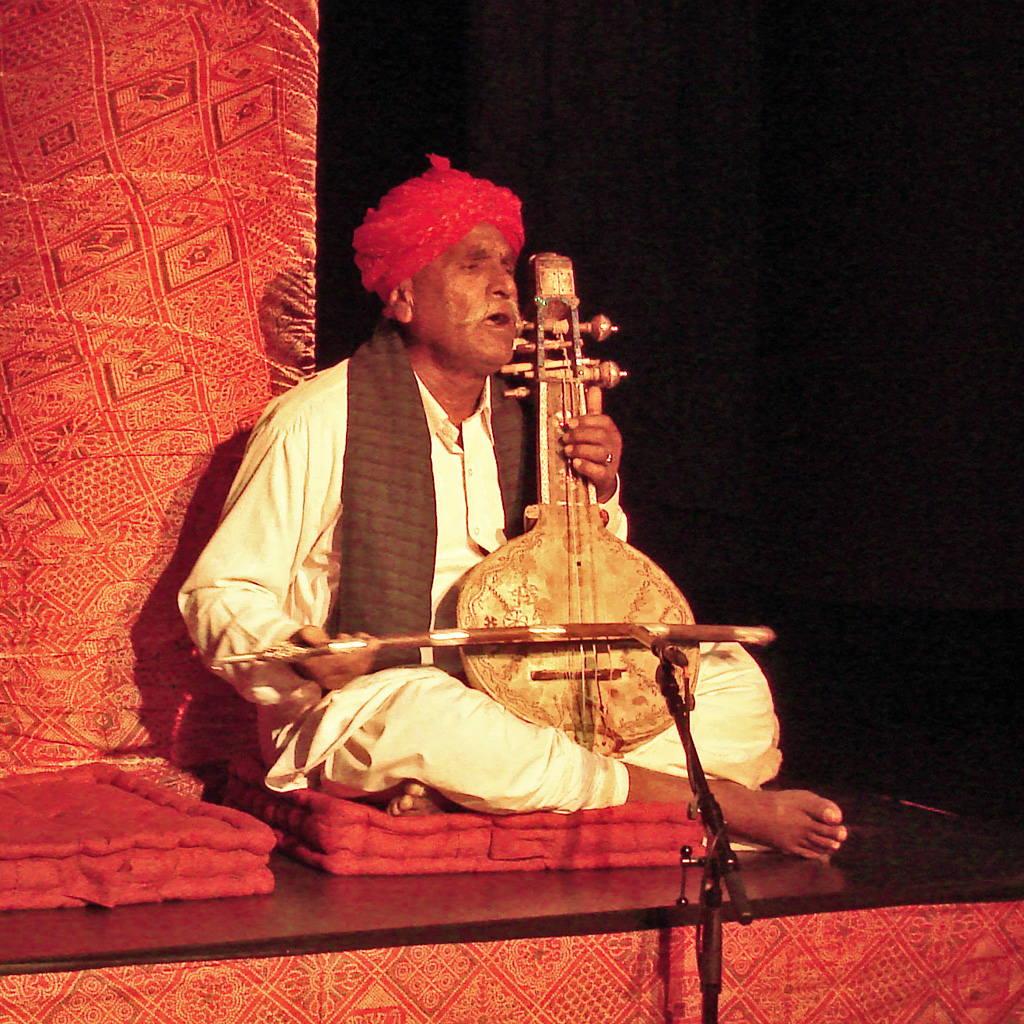 Musicien de l'ensemble de chants dévotionnels bhajan "Mahesa Ram" (musée du Quai Branly)